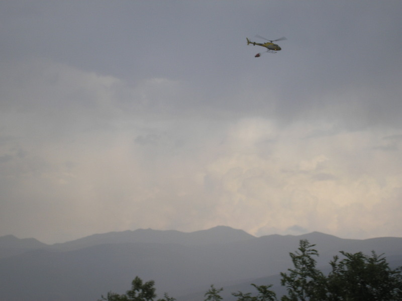 Un helicopter intenta apagar el foc de la població de Niula, Ger.